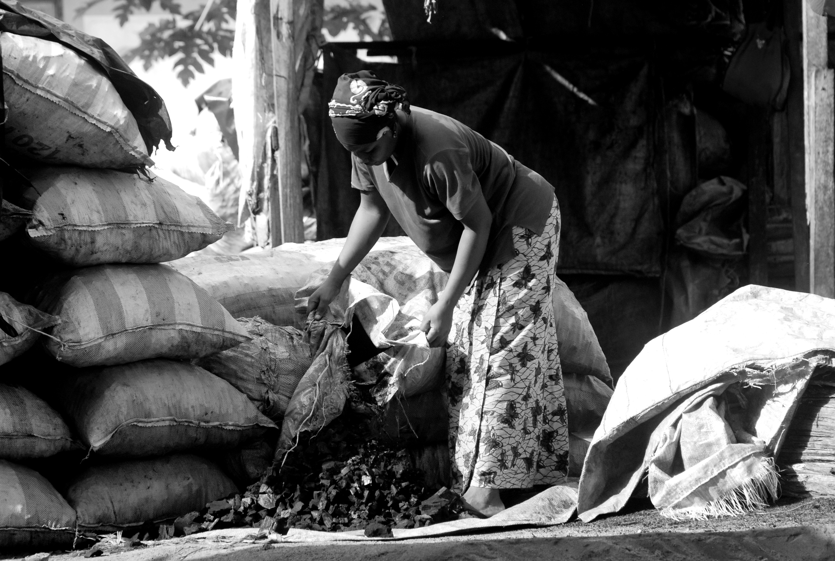 vendeuse de charbon dans la ville d'Abidjan This is an image of "African people at work" from Ivory Coast